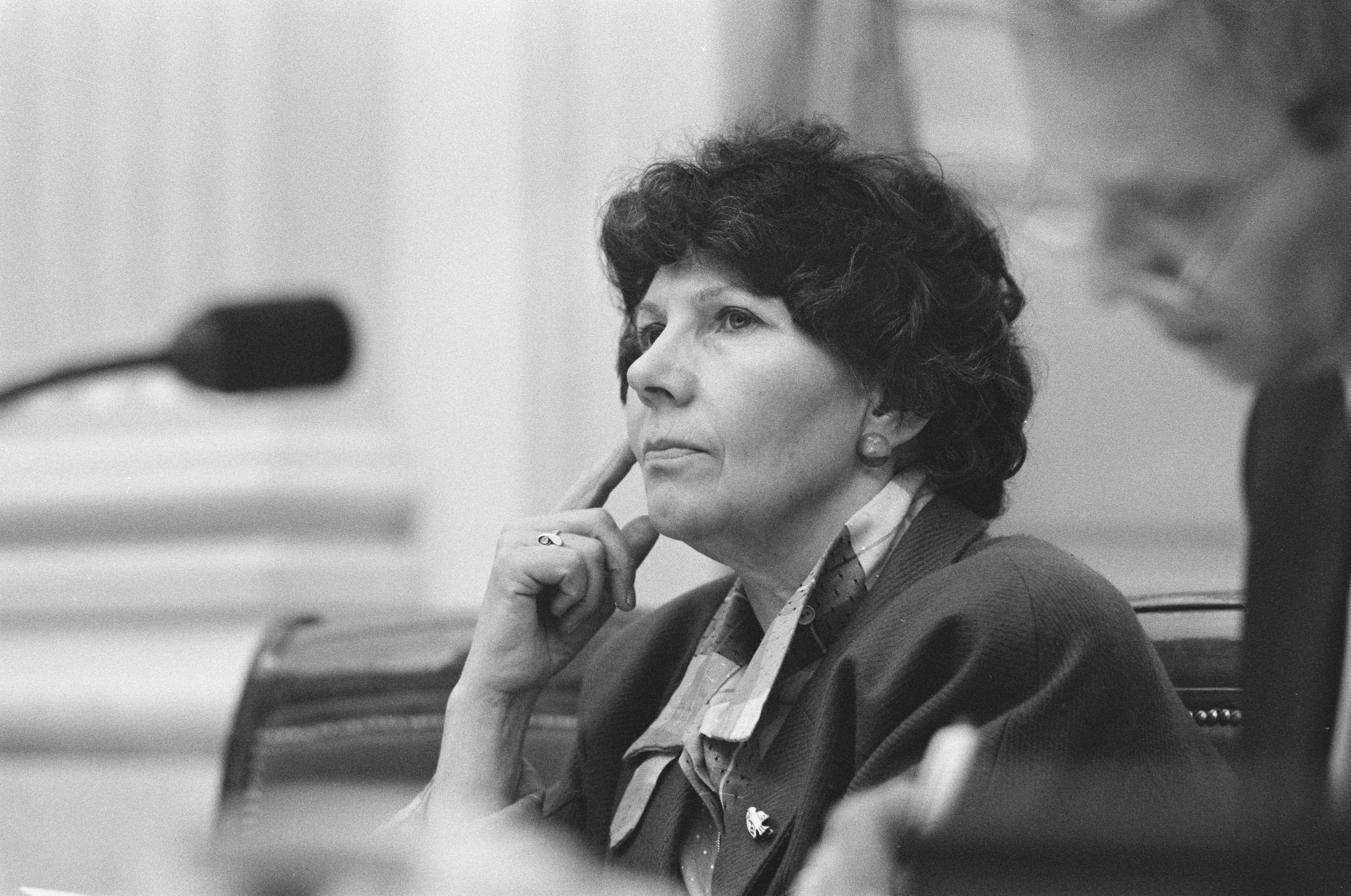 Collectie / Archief : Fotocollectie Anefo Reportage / Serie : [ onbekend ] Beschrijving : Tweede Kamer , bespreking nota vluchtelingenbeleid; staatssecretaris Korte van Hemel , close Datum : 9 april 1987 Trefwoorden : politiek Persoonsnaam : Korte-van Hemel, Virginie Fotograaf : Fotograaf Onbekend / Anefo Auteursrechthebbende : Nationaal Archief Materiaalsoort : Negatief (zwart/wit) Nummer archiefinventaris : bekijk toegang 2.24.01.05 Bestanddeelnummer : 933-9489